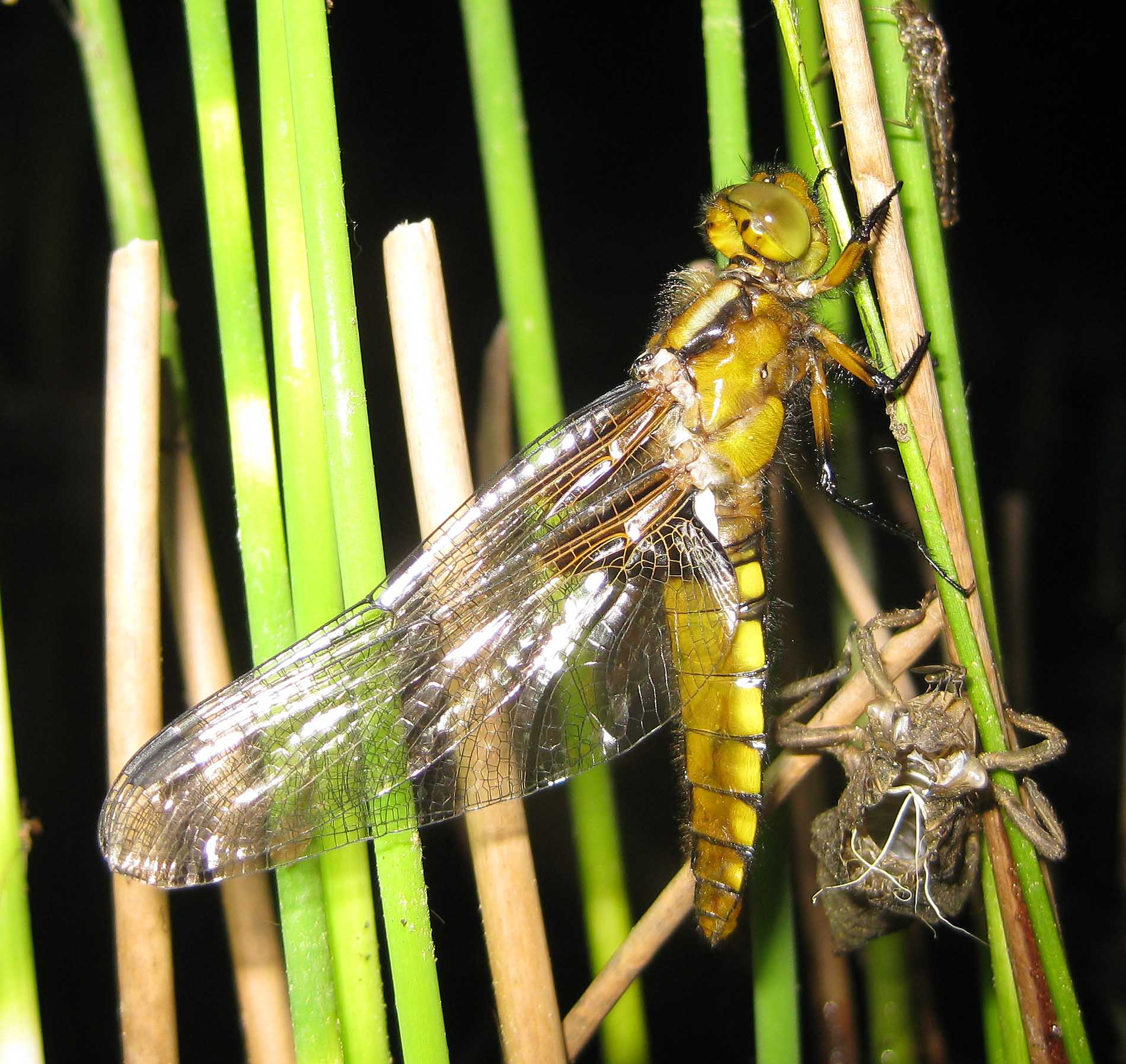 Frisch geschlüpfte Plattbauchlibelle mit Larvenhülle